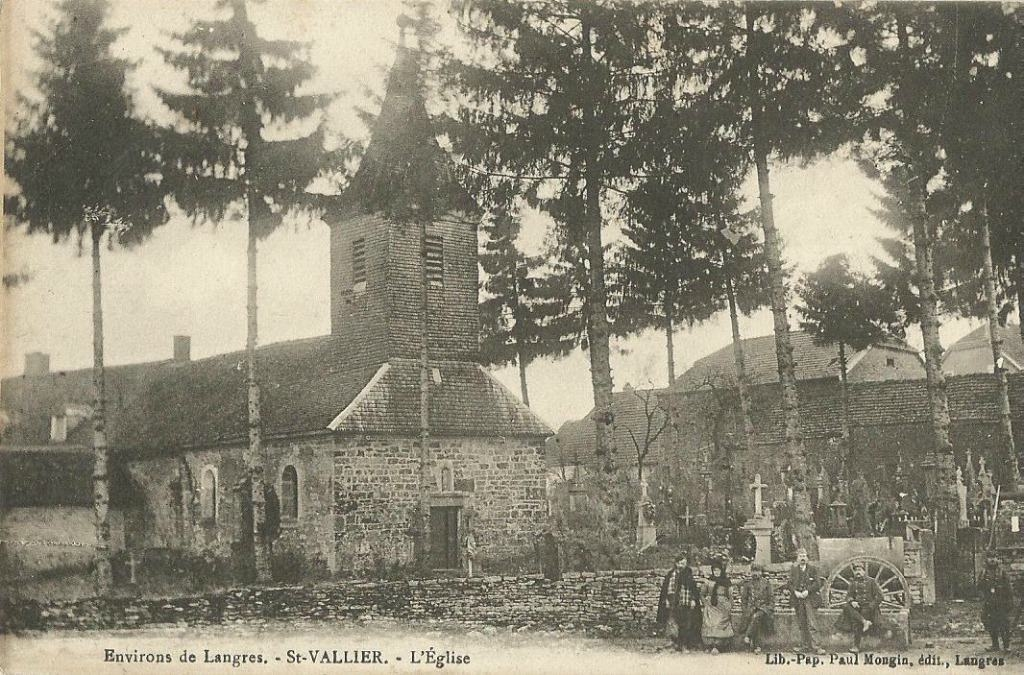 Carte postale de l'église vers 1910.